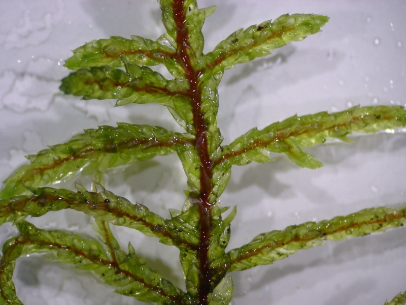 Rotstängelmoos (Pleurozium schreberi)